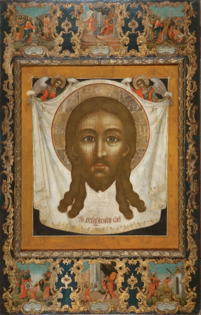 Спас Нерукотворный с историей образа Средник – первая половина XVII века Клейма – 2 половина XVIII века